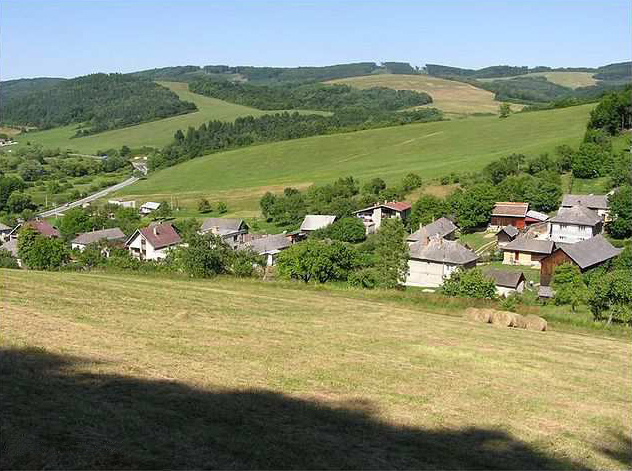 Celkový pohľad